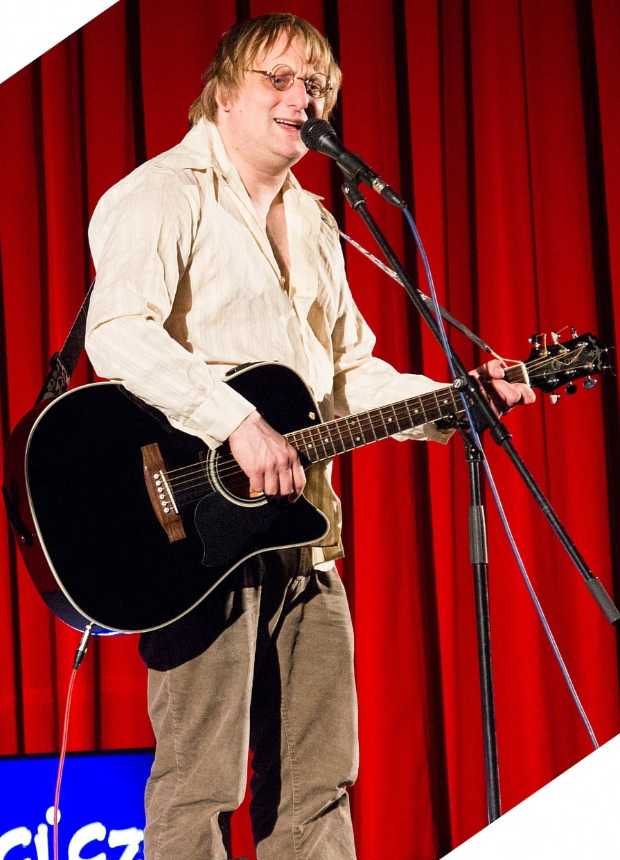 25. 2. 2013 vystoupení Lukáše Pavláska v třineckém kině Kosmos. Foto Jaromír Adámek 2013 (